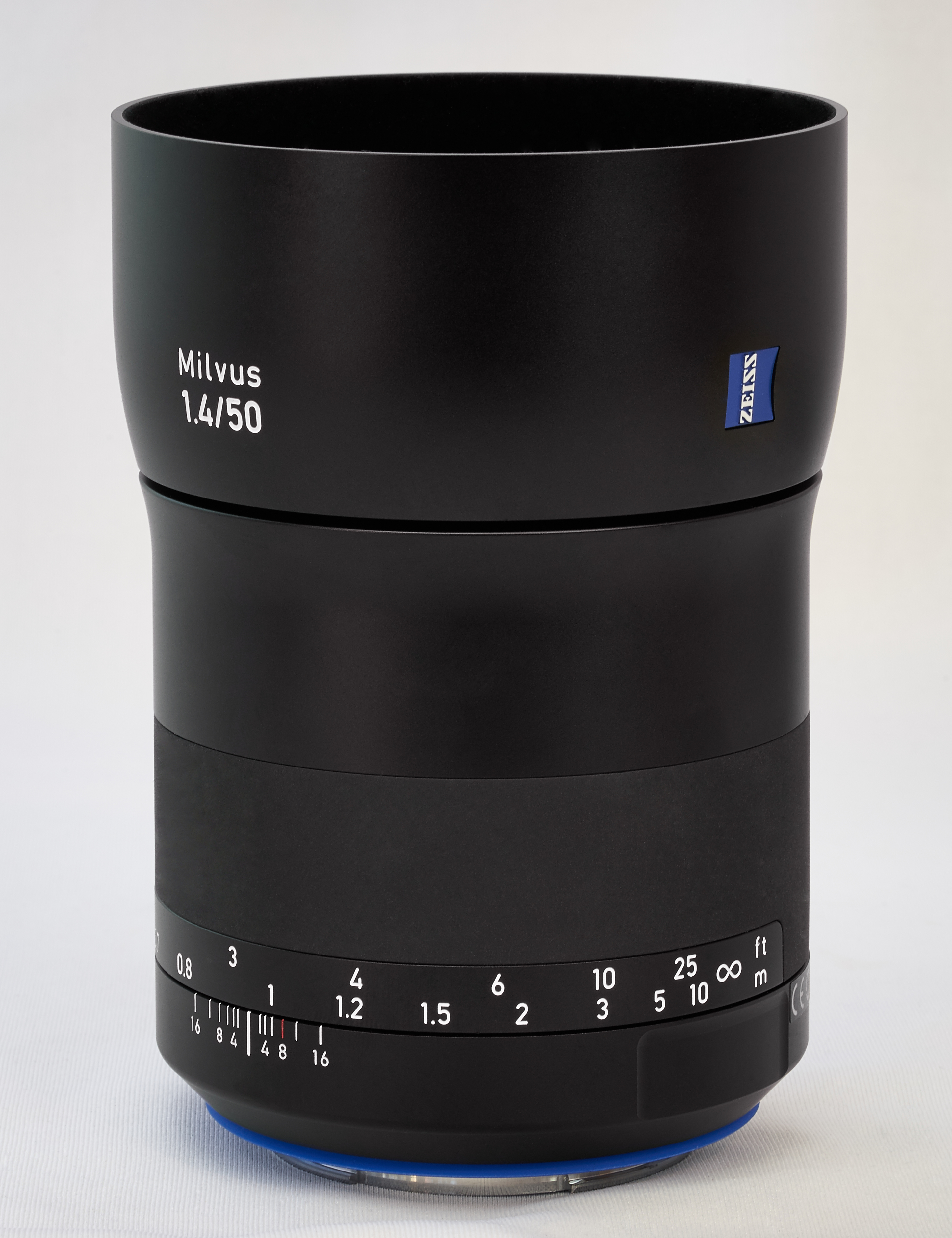 Zeiss Milvus f/1.4 50mm ZE